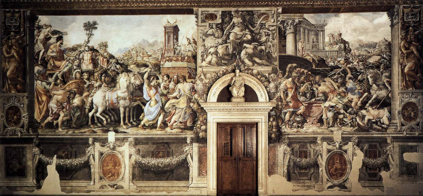 SALVIATI, Cecchino del Scenes from the Life of Furius Camillus Fresco Palazzo Vecchio, Florence